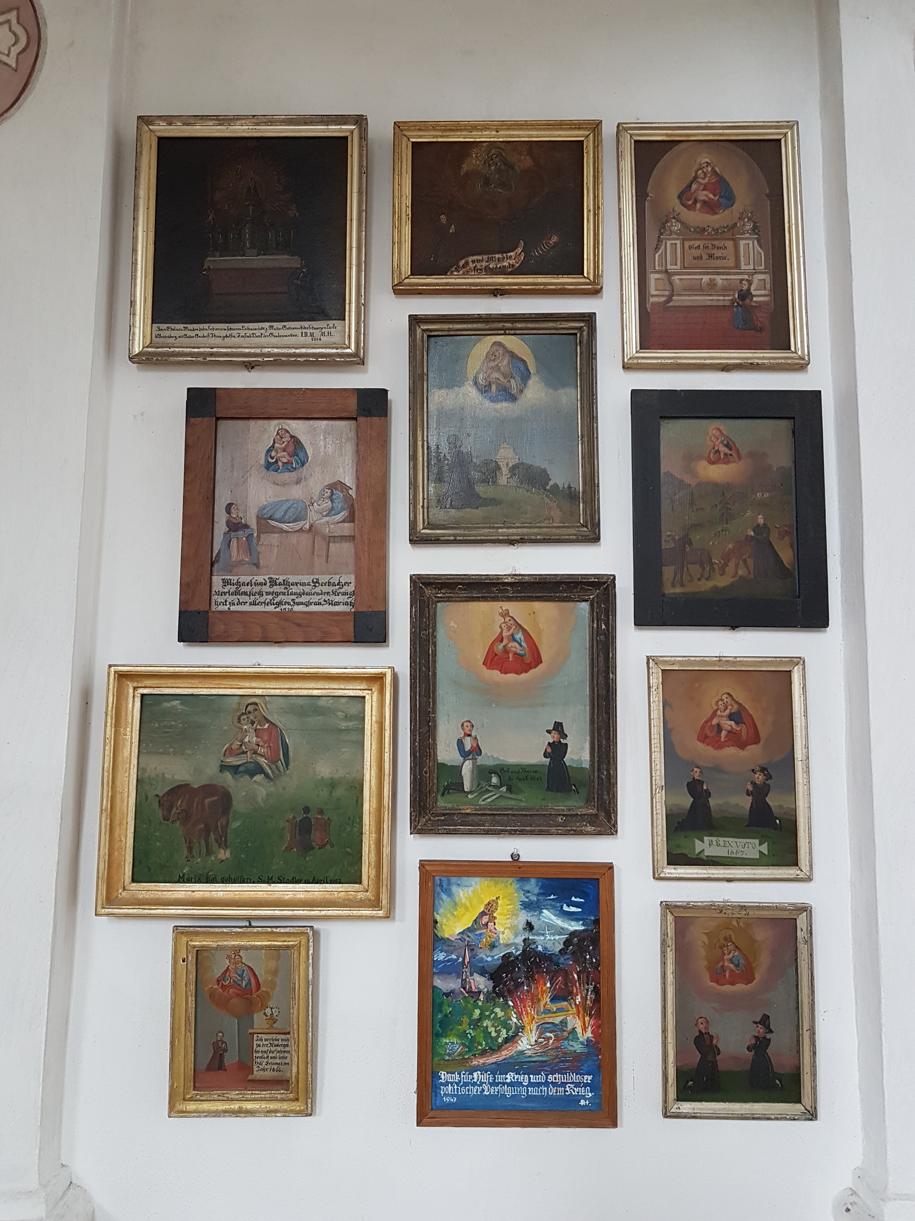 Wallfahrtskirche Schwarzlack, Votivtafeln an der Langhauswand